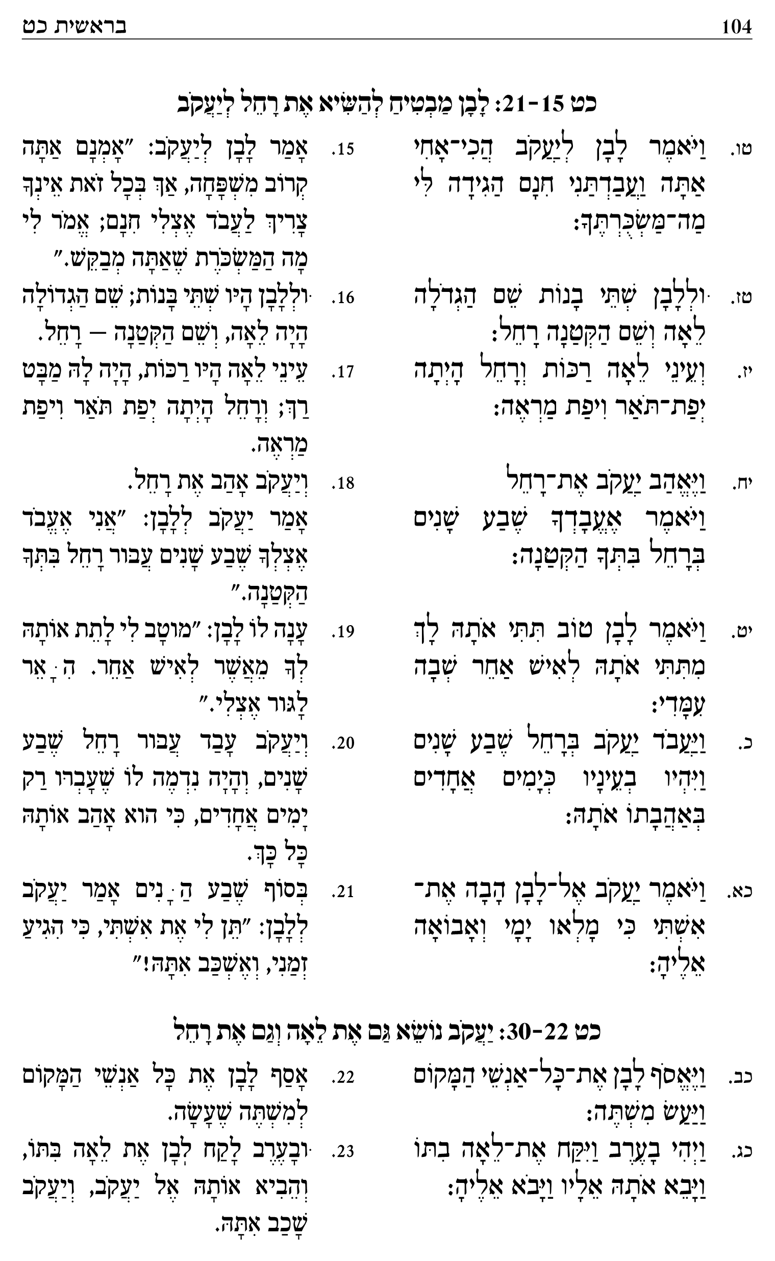 he:תנ"ך רם, עמוד מספר בראשית